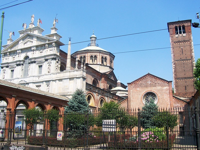 Milano - Chiesa di S. Maria dei Miracoli presso S. Celso